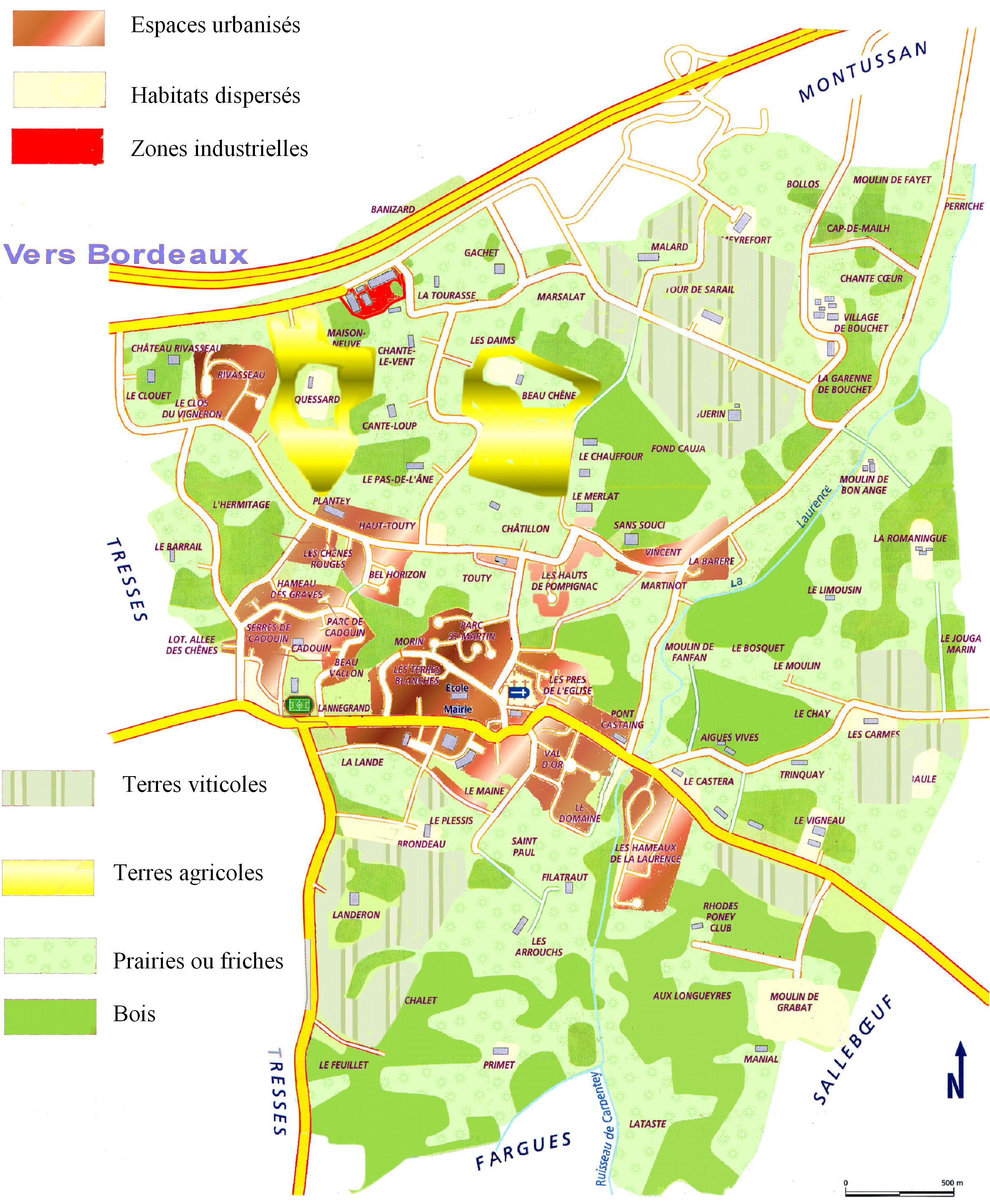 L'occupation de l'espace dans la commune de Pompignac